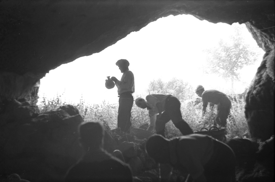 Obrers treballant a l'entrada de la Cova de l'Or (Beniarrés, Comtat). 1955 [ Arxiu Negatius - 1966]